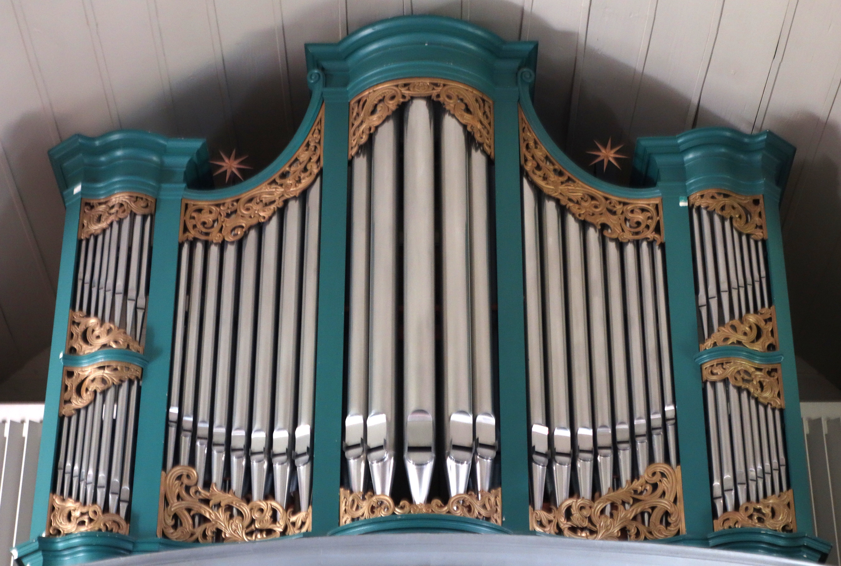 Orgel der Maria-Magdalenen-Kirche, Bad Bramstedt, Schleswig-Holstein, Deutschland